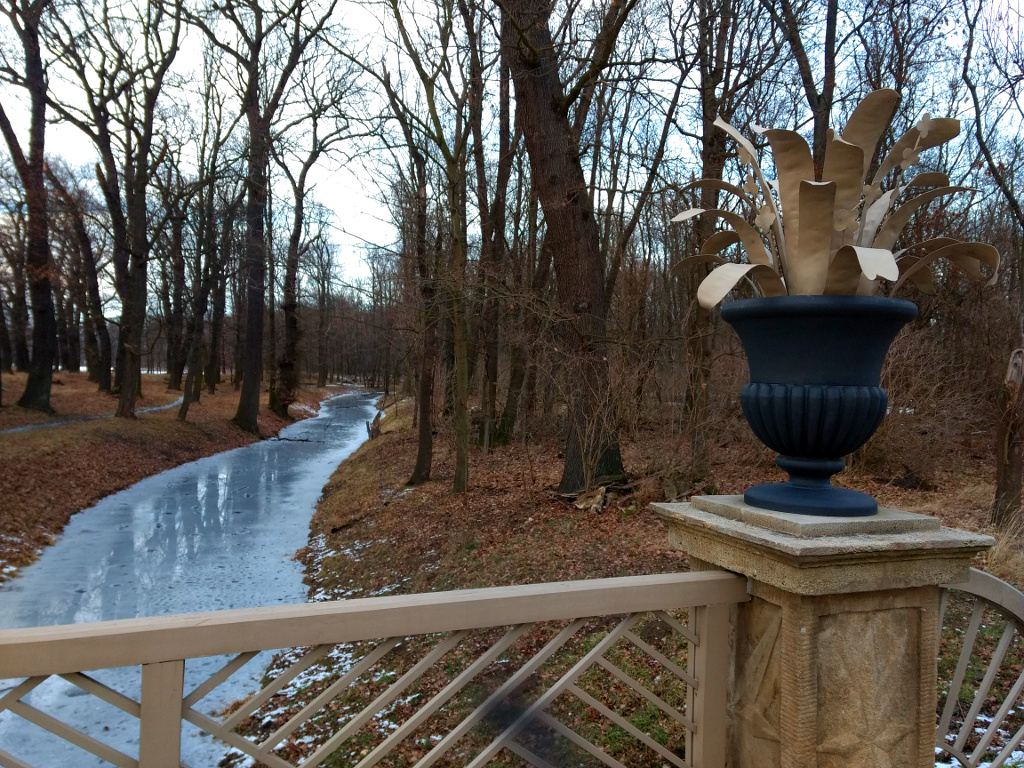 Mlýnský potok, Veltrusy